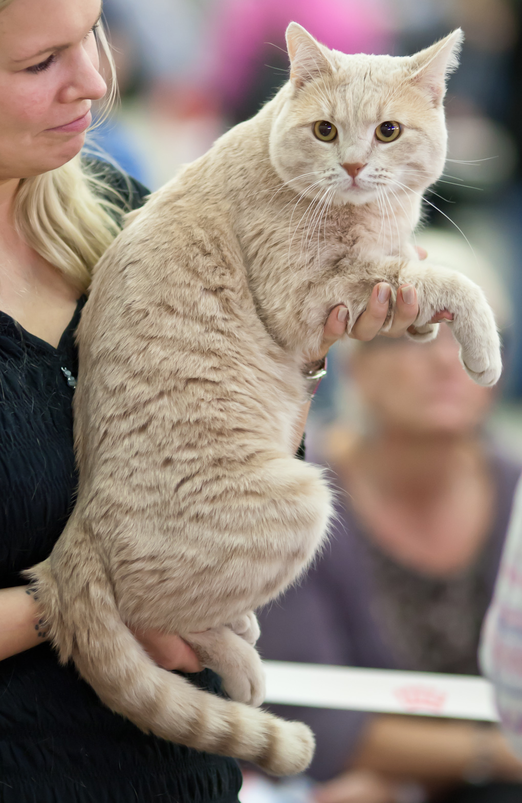 European shorthair mâle à l'exposition féline de Turku. IC Kassilan Gentle Goblin (Hillervo) [EUR e 23] male EX1 CAGCIB NOM